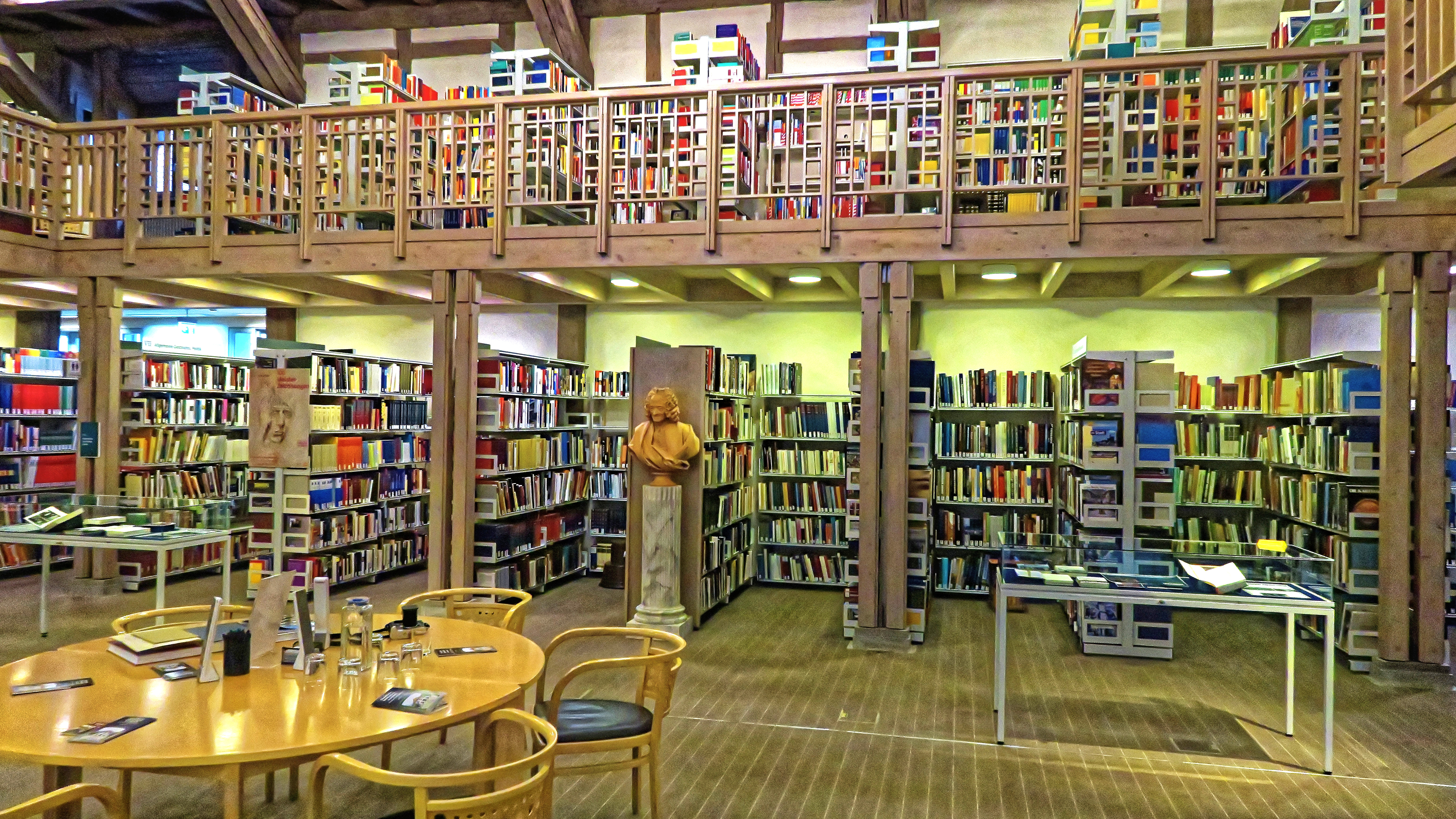 Bilder und Eindrücke von der Staatsbibliothek Ansbach, die untergebracht ist in der ehemaligen, für diese Zwecke umgebauten Reithalle des markgräflichen Schlosses